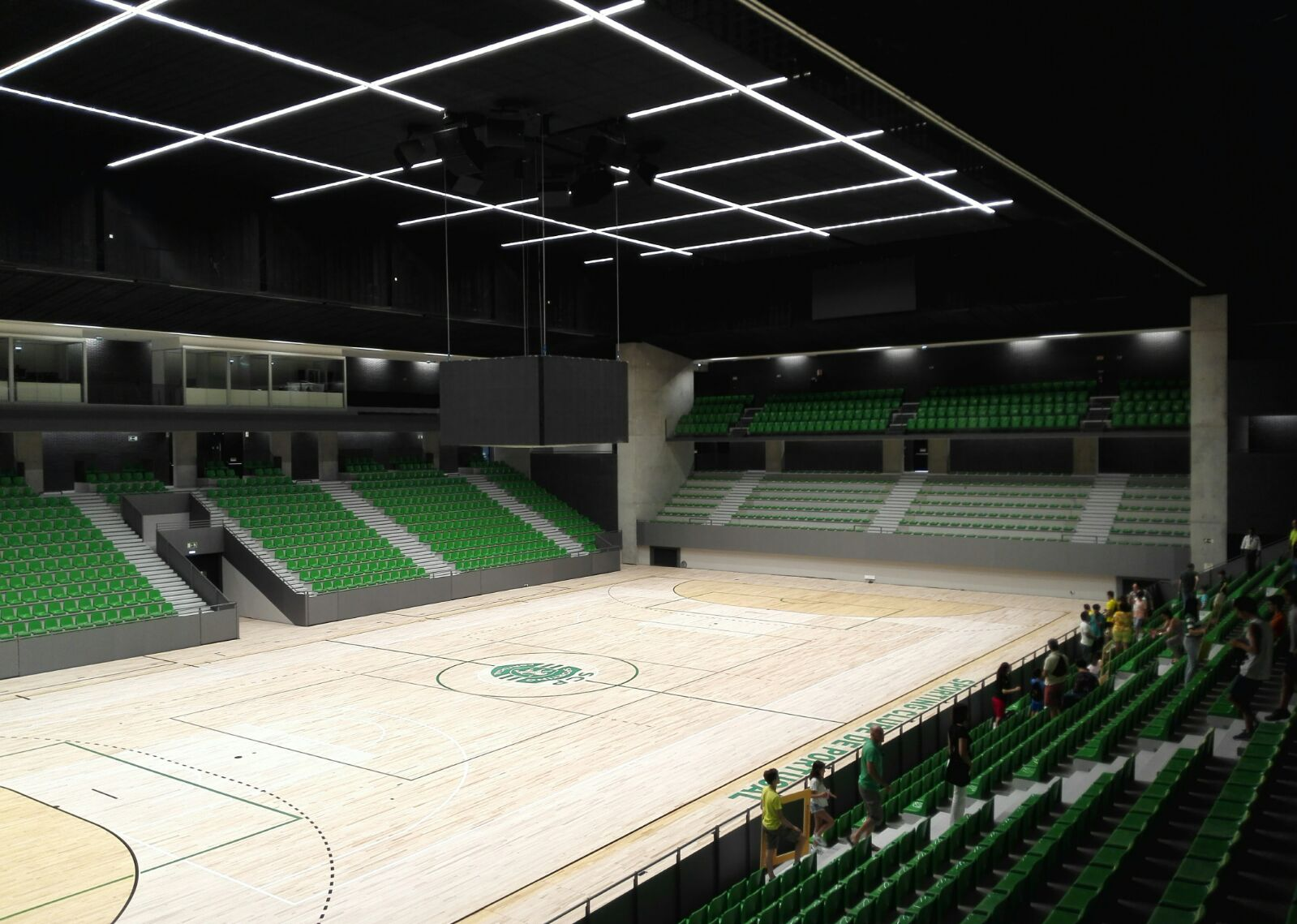 Interior do Pavilhão João Rocha aquando do aniversário do clube proprietário, Sporting Clube de Portugal.